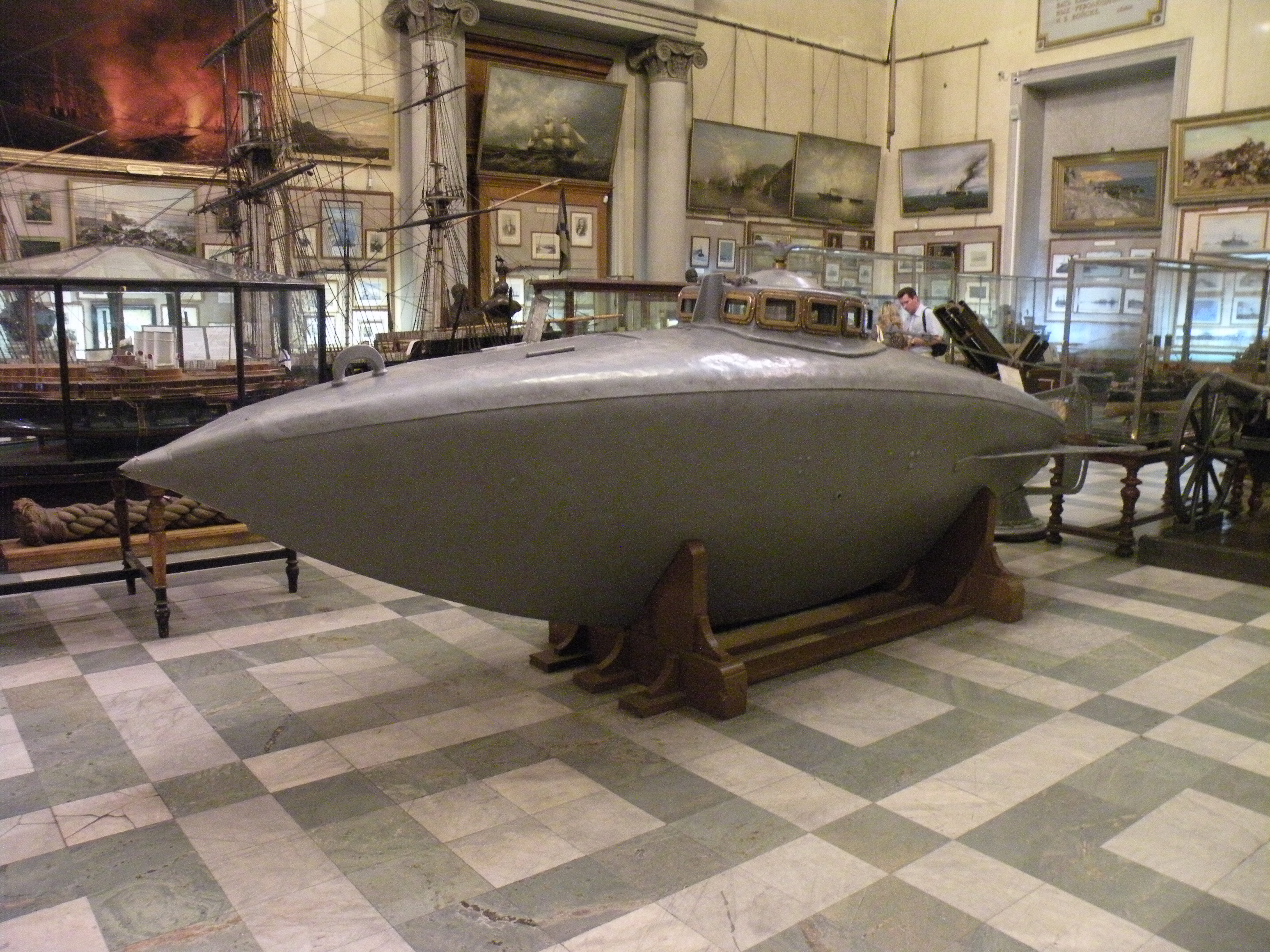 Łódź podwodna Stefana Drzewieckiego, Centralne Muzeum Wojenno-Morskie w Petersburgu